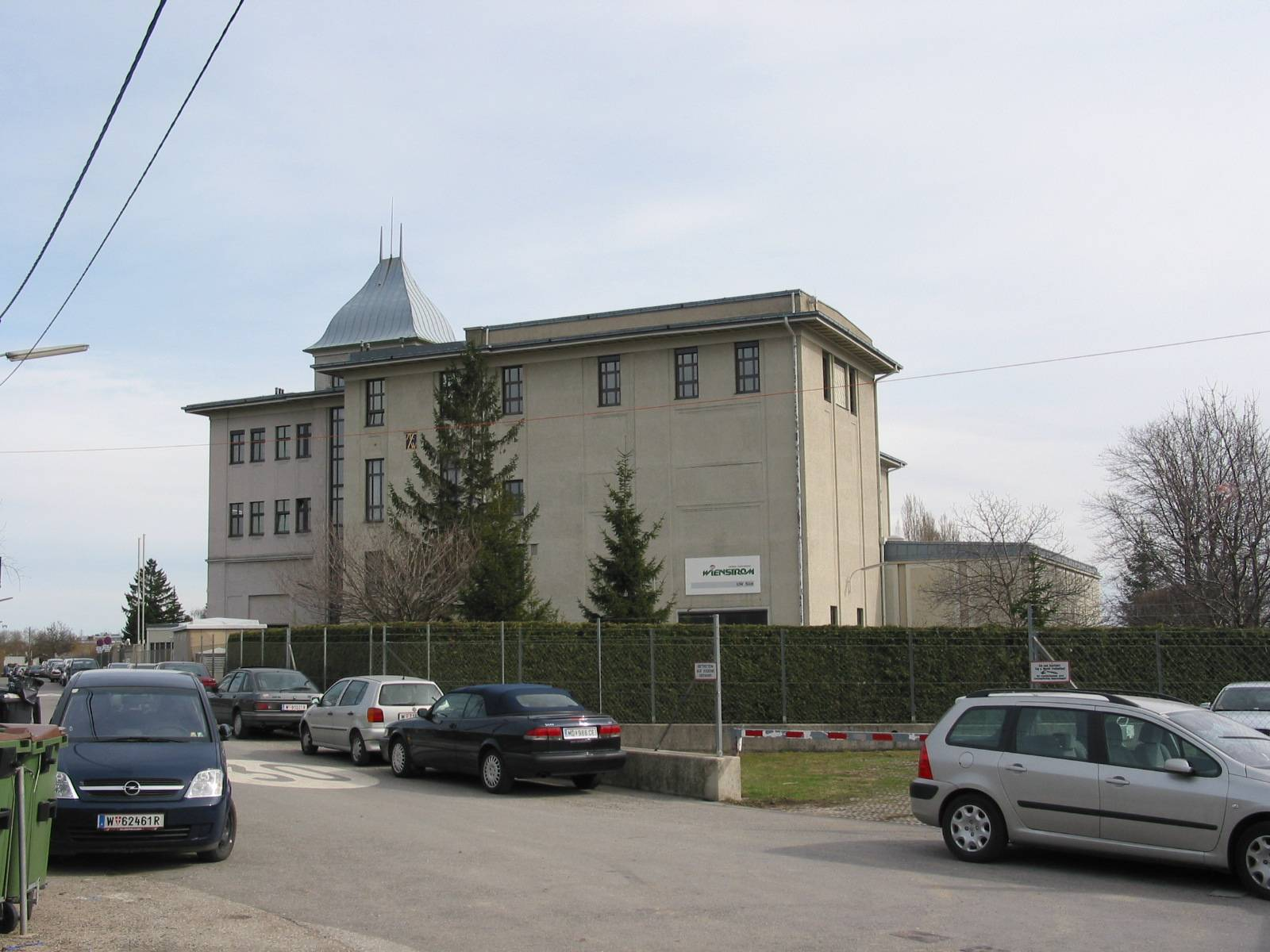 Umspannwerk Pottendorfer Straße, 2006-03-30 own work